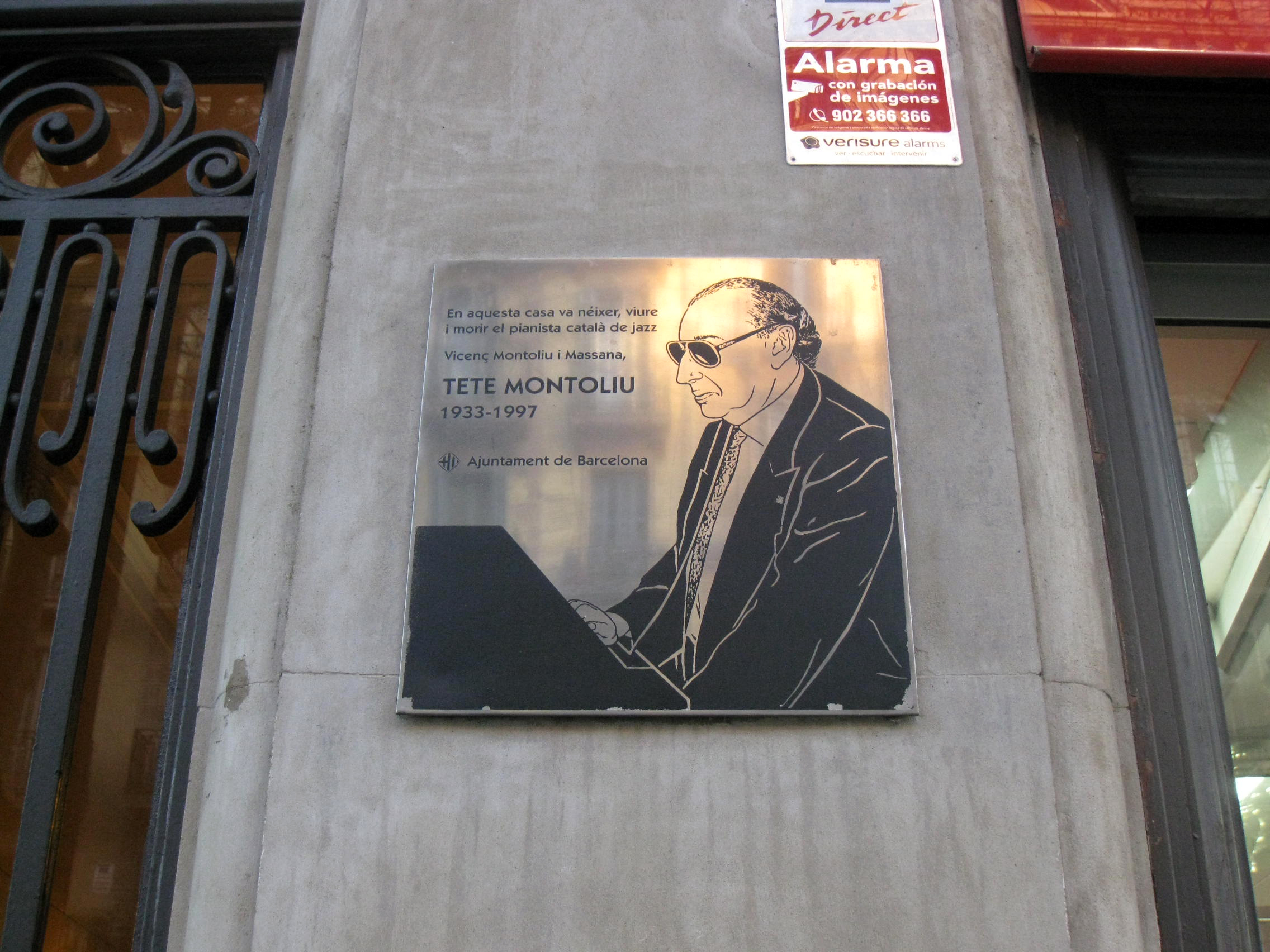 Tete Montolíu. C. Muntaner, 83A (Barcelona)